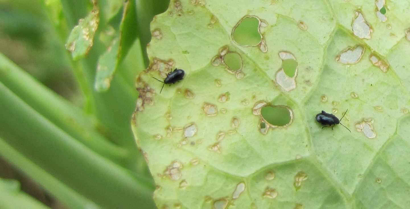 Trous réalisés par les altises sur un chou perpétuel Daubenton